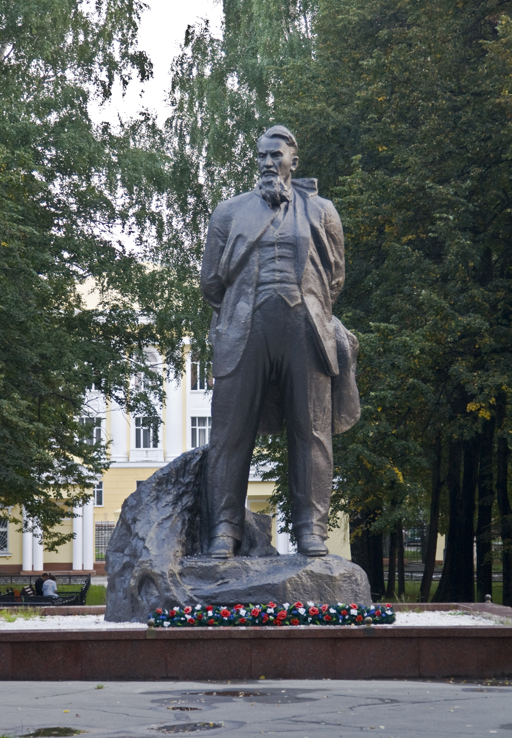 И. В. Курчатов. Озерск. Челябинская область. Россия